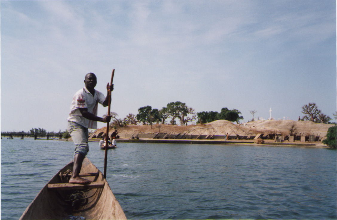 Un gondolier sur une pirogue avec au fond le cimetière du village de Fadiouth (Sénégal). Photo prise en décembre 1998 par Pierre Lescanne Pierre de Lyon